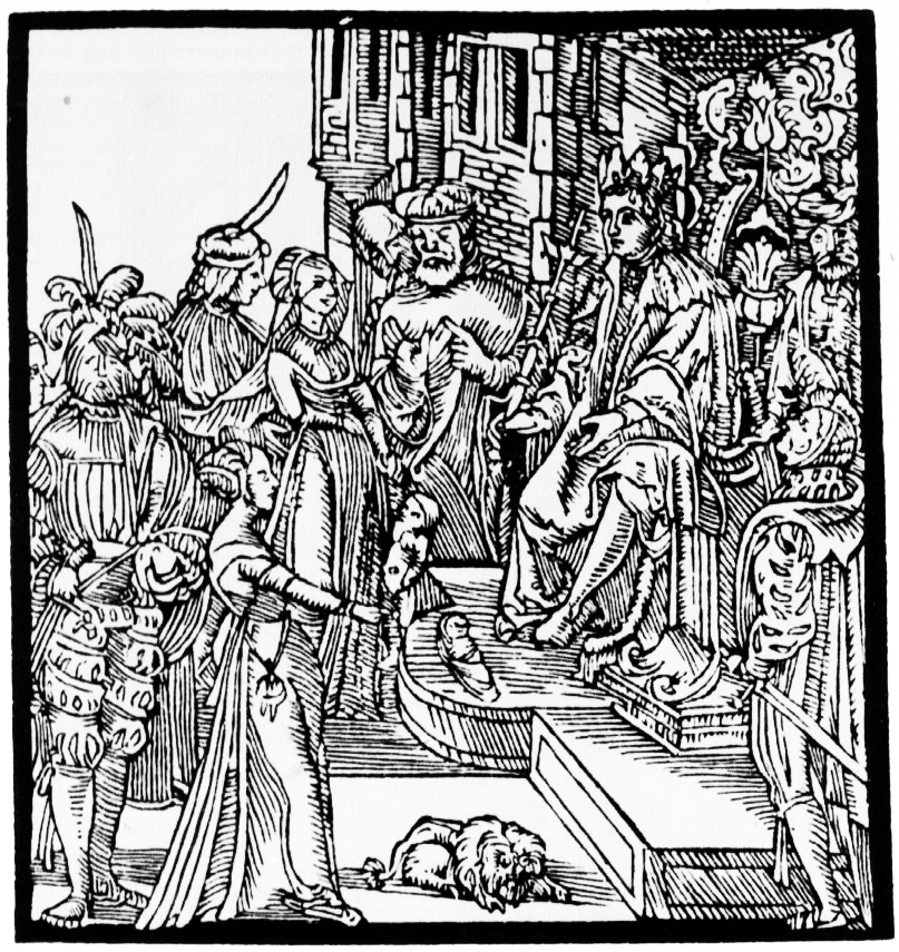 "Суд Саламона" ("Первый судъ, еже судил Саломонъ царь две жене блудъници о двоихъ детехъ"). Прытчы Саламонавы. Прага, 1517. Тытульны аркуш (таксама на ар. 5 гравюра выкарыстана ў якасці застаўкі). 87Х86 мм.